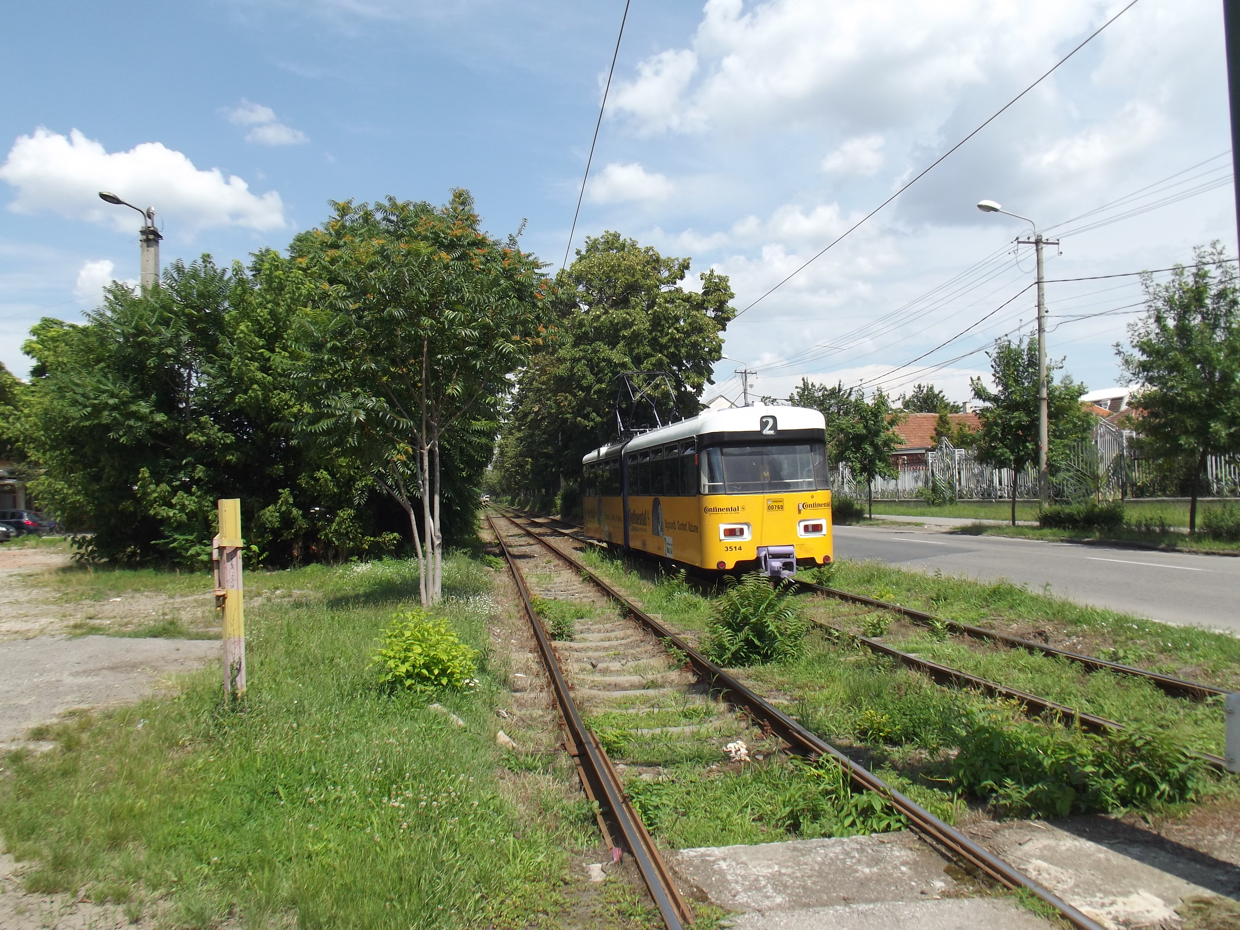 Tram in Timişoara bij de noordelijke lus.